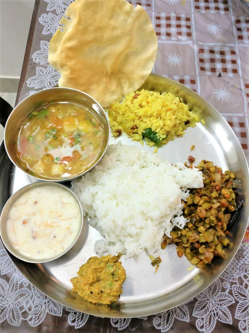 ముఖ్యమైన రోజున ఇంటి శాకాహార భోజనము